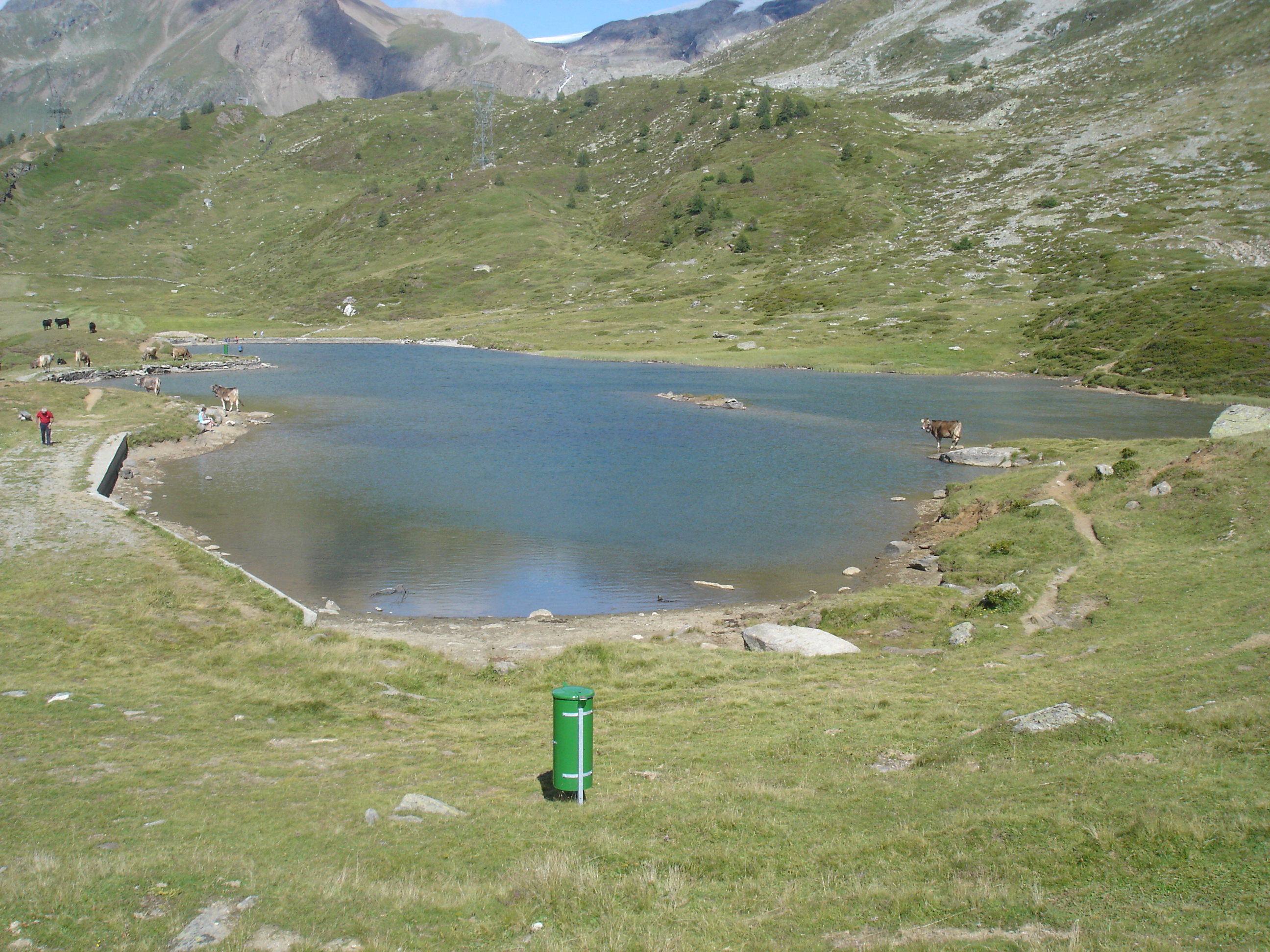 Rotelsee auf dem Simplonpass